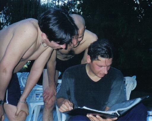 Oliver e Schneider, membros da banda Rammstein vendo pasta de um fan brasileiro. - Domingo dia 18/04/1999 por volta das 17:00h Piscina do Hotel Transamérica, Porto Alegre , Brasil